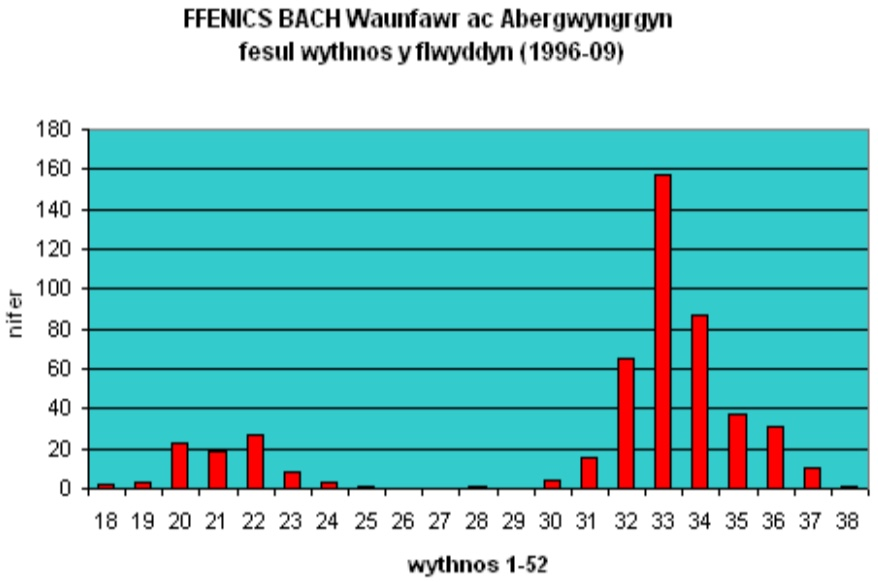 Ffenogram gwyfyn y Ffenics bach, trapiau Waunfawr ac Abergwyngregyn, 1996-2009